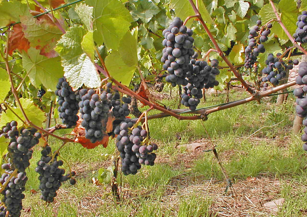 Rout Drauwen